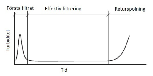 Figuren visar hur turbiditeten ändras i de olika stegen i snabbfilter.